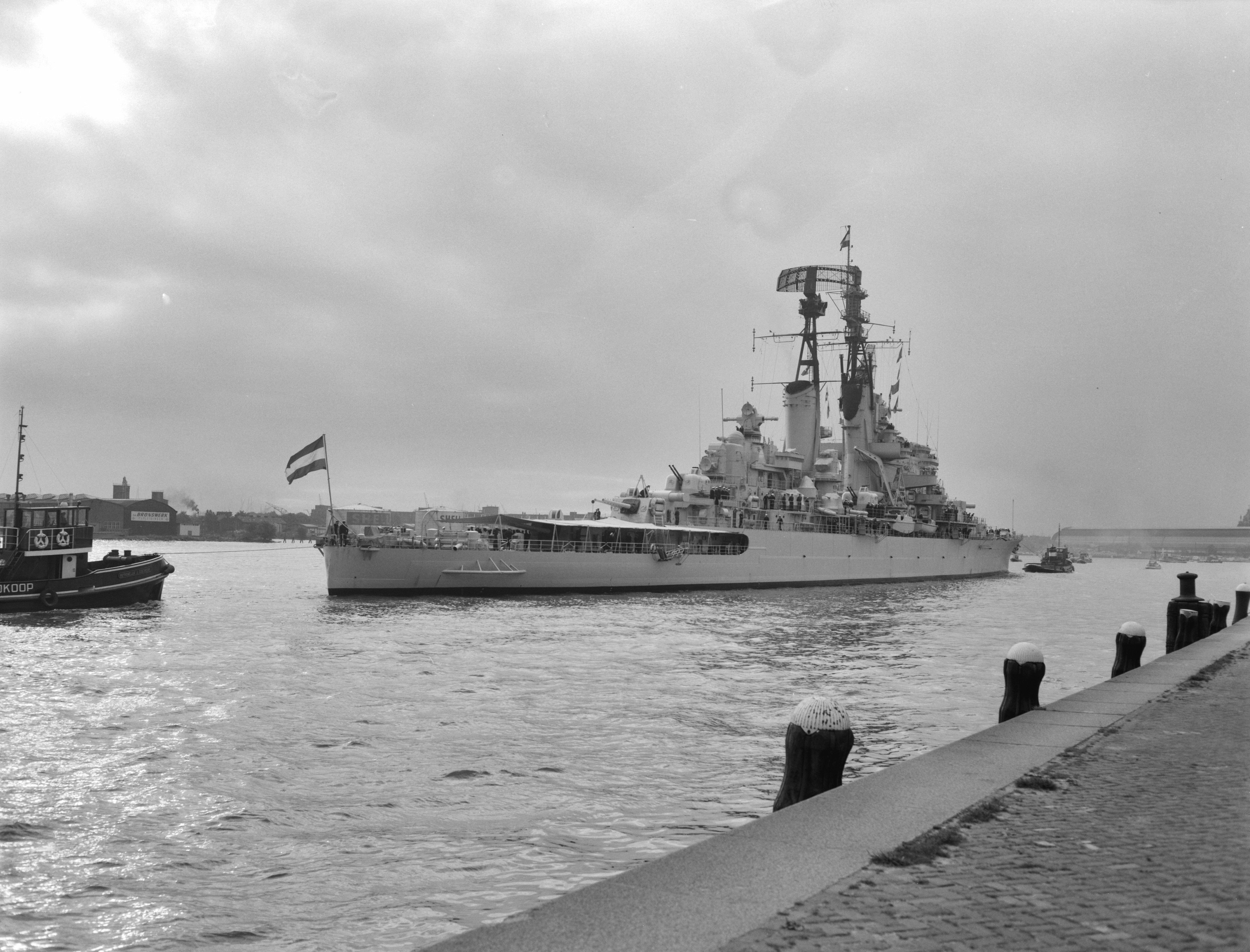 Collectie / Archief : Fotocollectie Anefo Reportage / Serie : [ onbekend ] Beschrijving : Marine Beneluxdagen in Amsterdamse Haven, aankomst Hr. Ms. Kruiser De Ruyter Datum : 21 september 1962 Trefwoorden : MARINE, aankomsten, havens Persoonsnaam : Hr. Ms. Kruiser De Ruyter Fotograaf : Bilsen, Joop van / Anefo Auteursrechthebbende : Nationaal Archief Materiaalsoort : Negatief (zwart/wit) Nummer archiefinventaris : bekijk toegang 2.24.01.04 Bestanddeelnummer : 914-3312